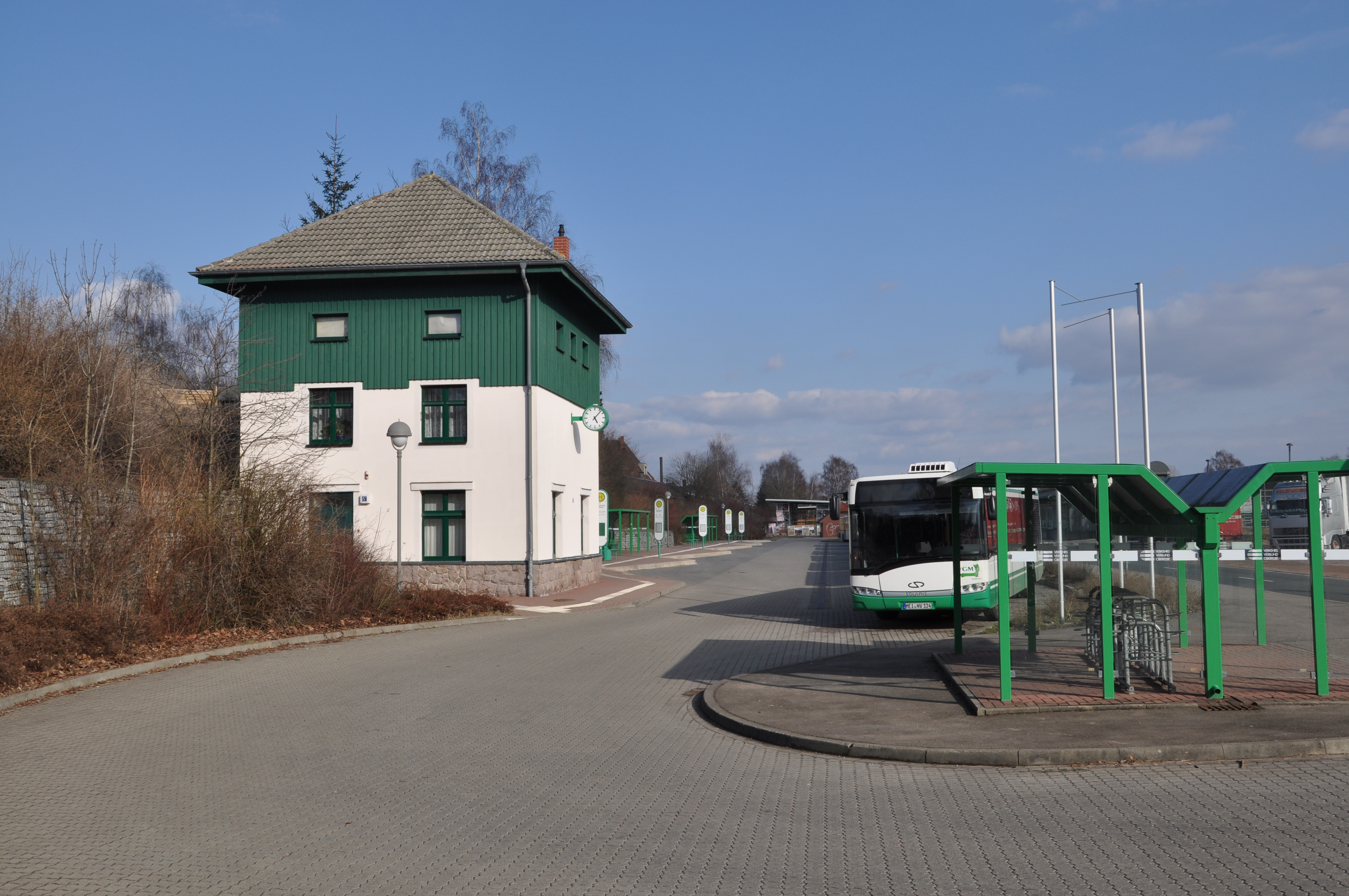 Bahnhof Lommatzsch, Bushaltestellen und Wasserhaus der früheren Schmalspurbahn